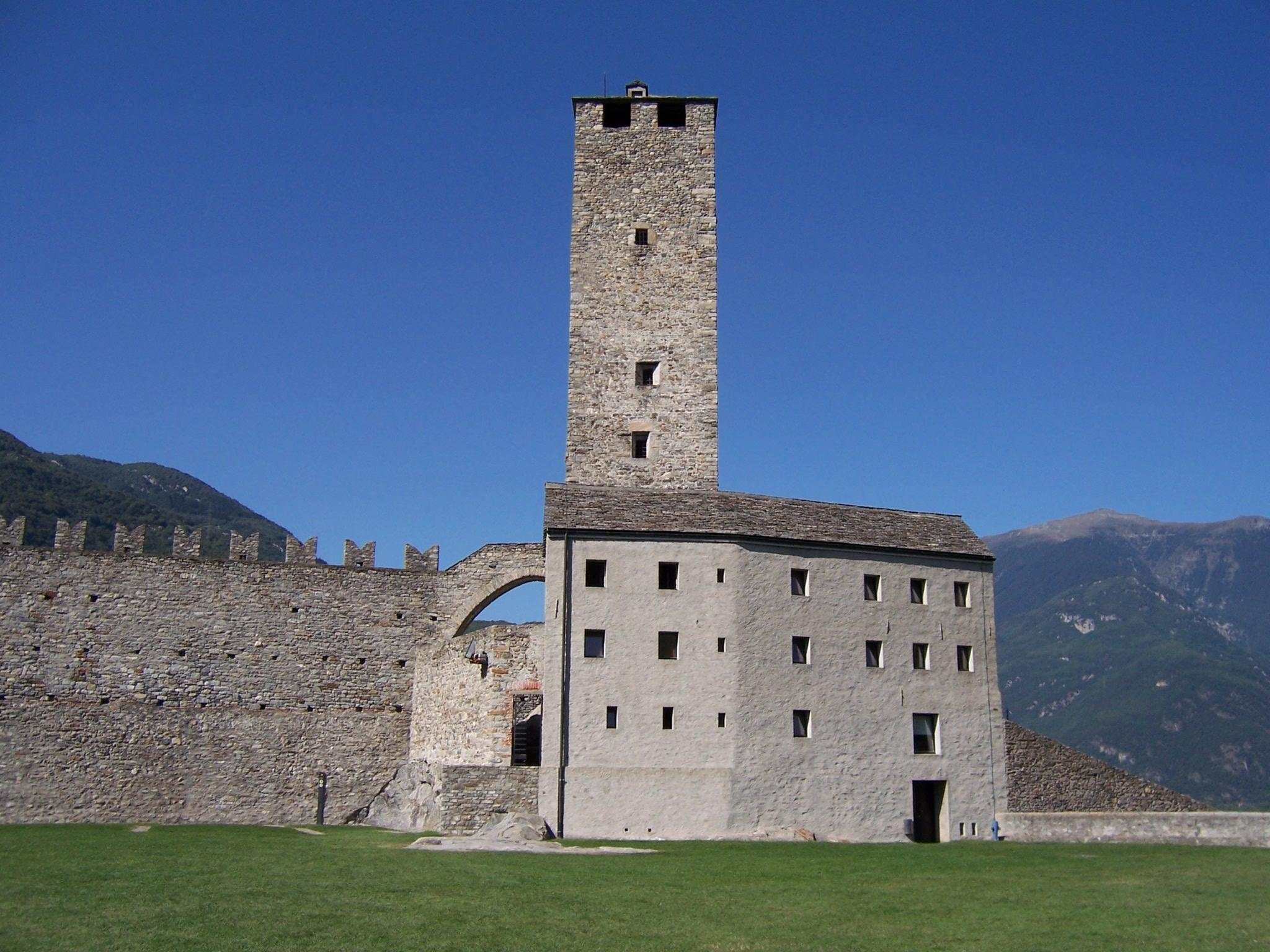 „Weißer Turm“ (Torre Bianca) der Burg Castelgrande in Bellinzona (Kanton Tessin / Ticino, Schweiz)